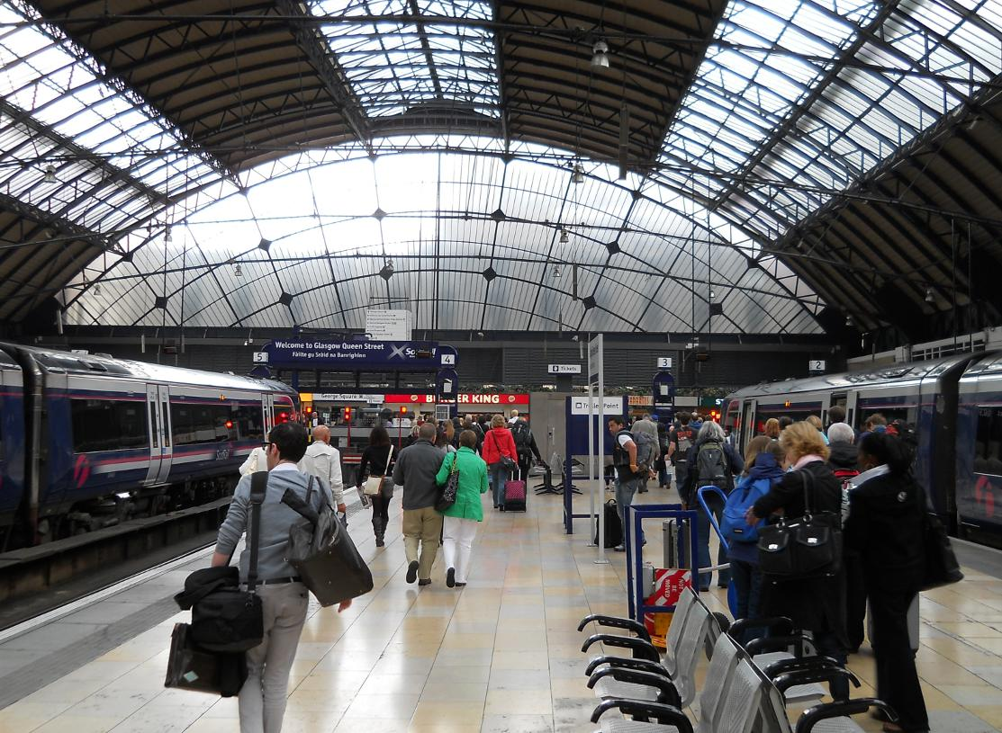 Binari della stazione di Glasgow Queen Street